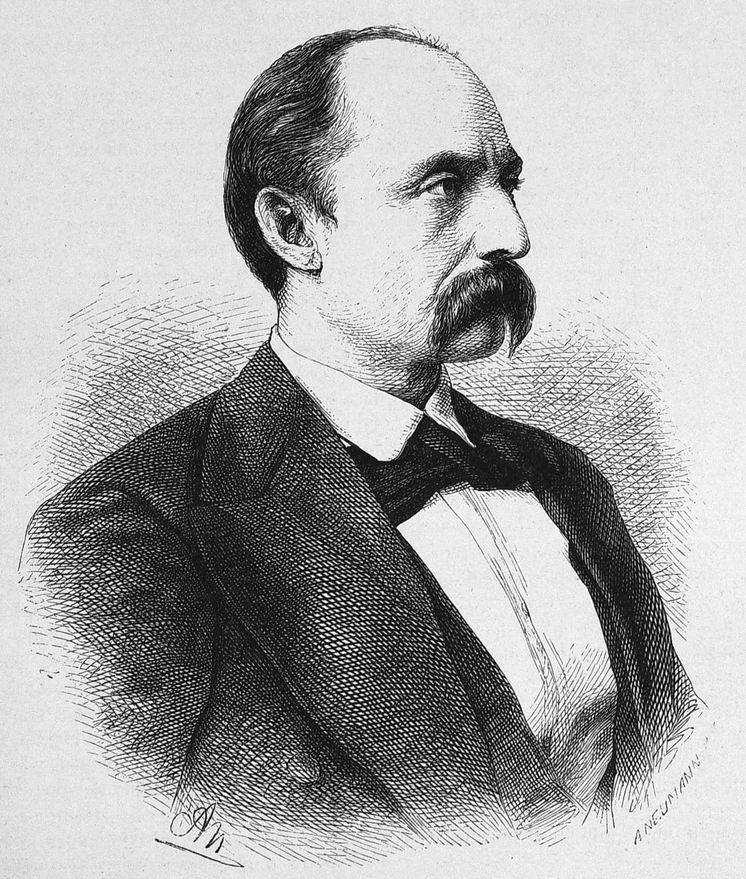 Friedrich Spielhagen, by Adolf Neumann